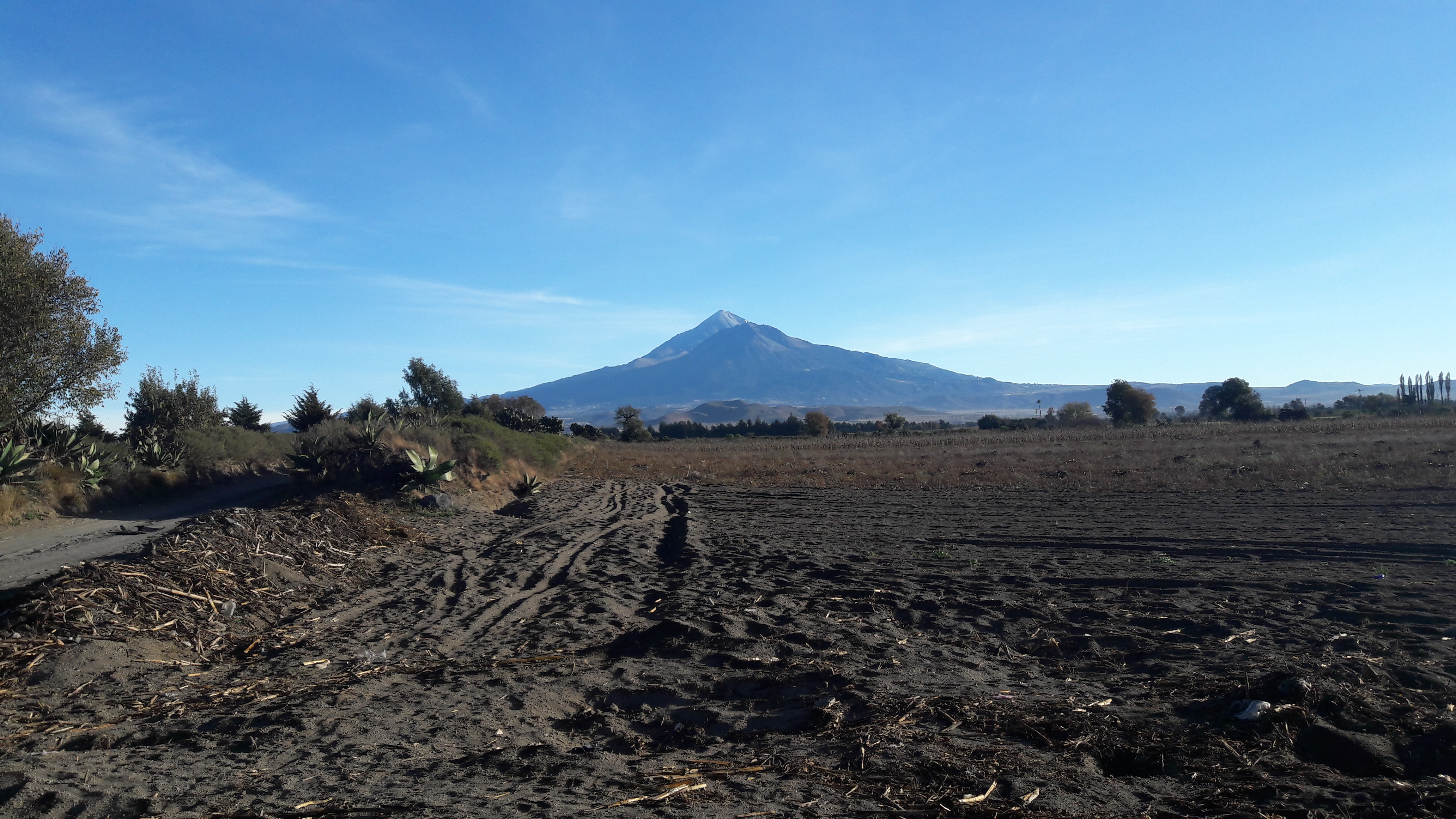 Pico de Orizaba